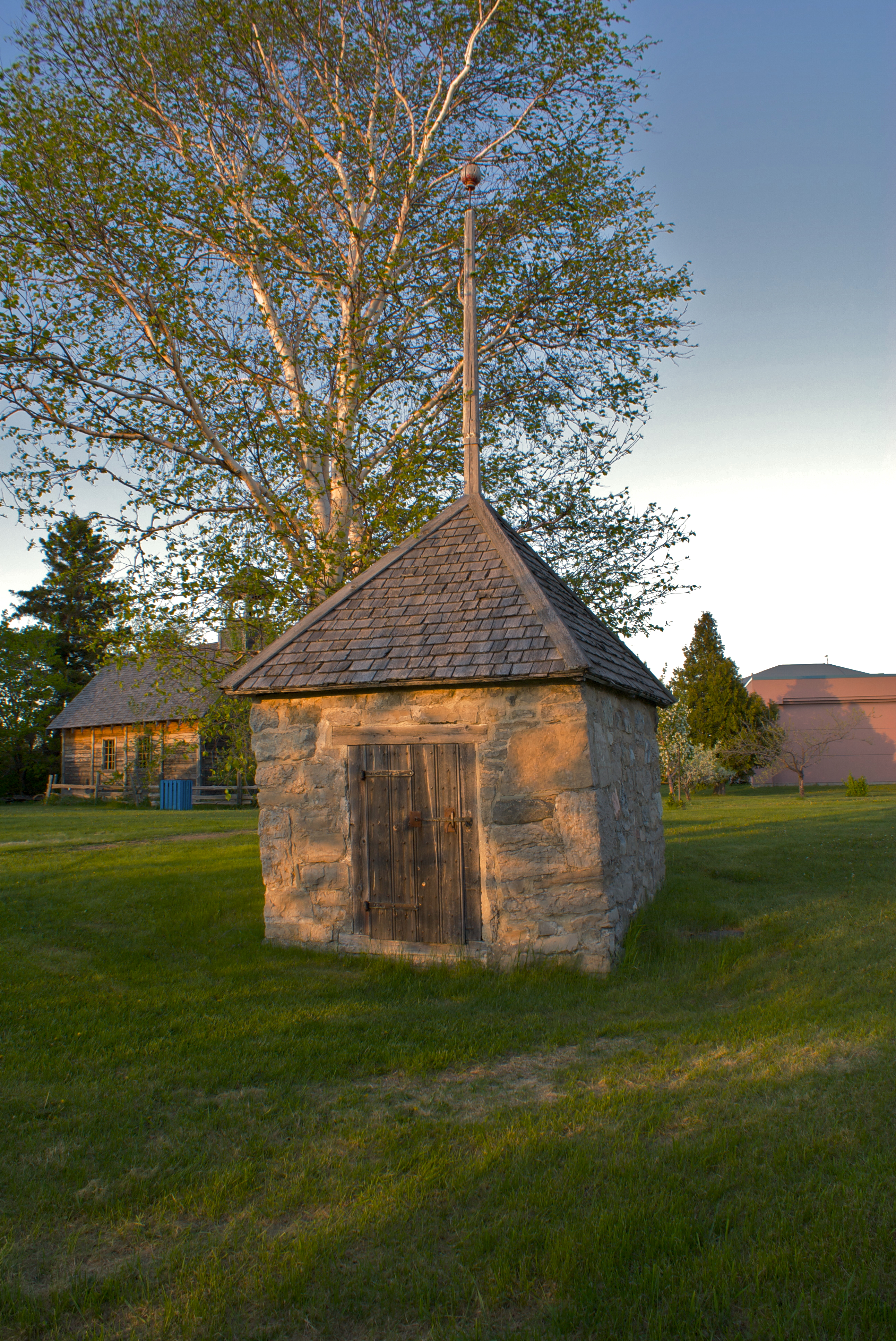 Poudrière construite en 1770 sur le bord de la rivière Métabetchouane à Desbiens, Québec.